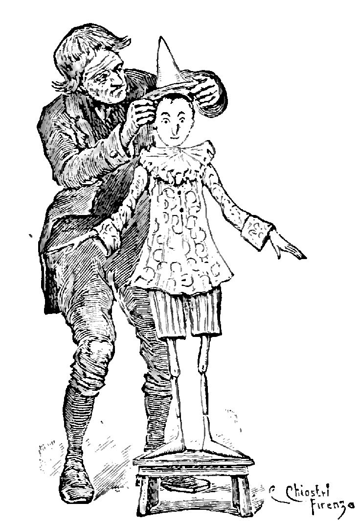 Illustrations from "Le avventure di Pinocchio, storia di un burattino", Carlo Collodi, Bemporad & figlio, Firenze 1902 (Drawings and engravings by Carlo Chiostri, and A. Bongini)